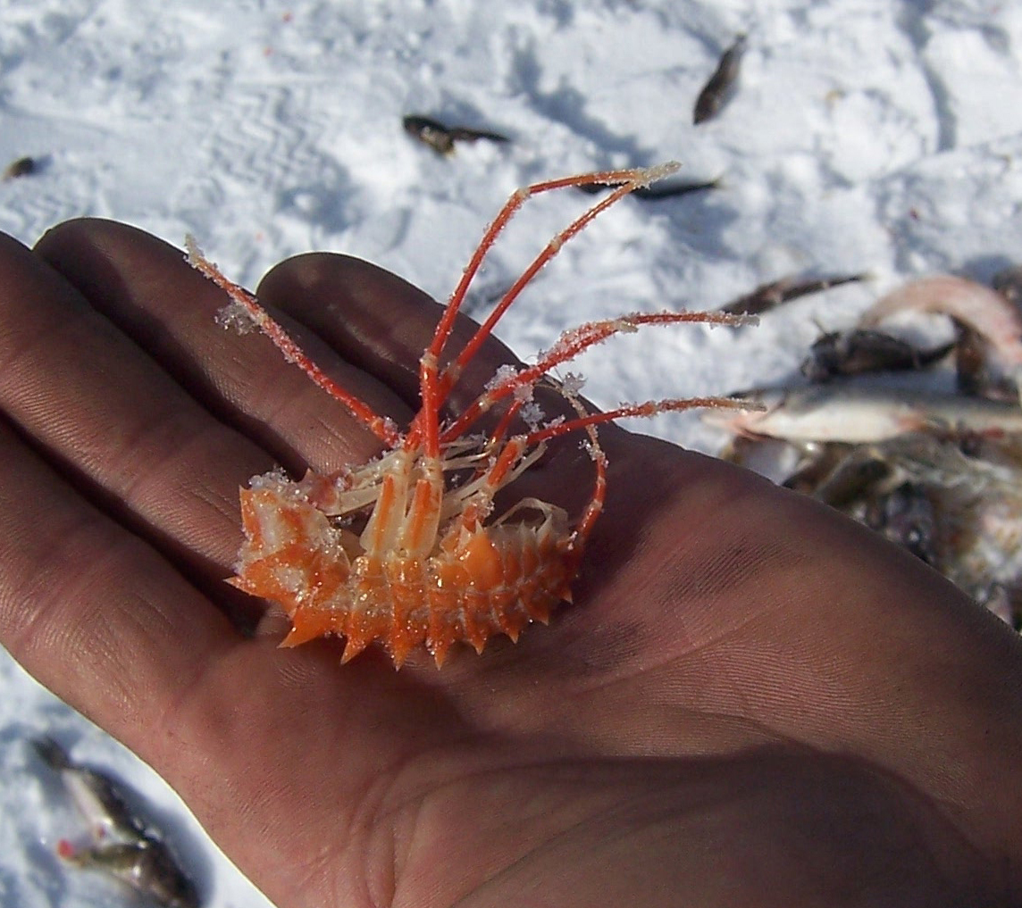 Flohkrebs aus dem Baikal-See